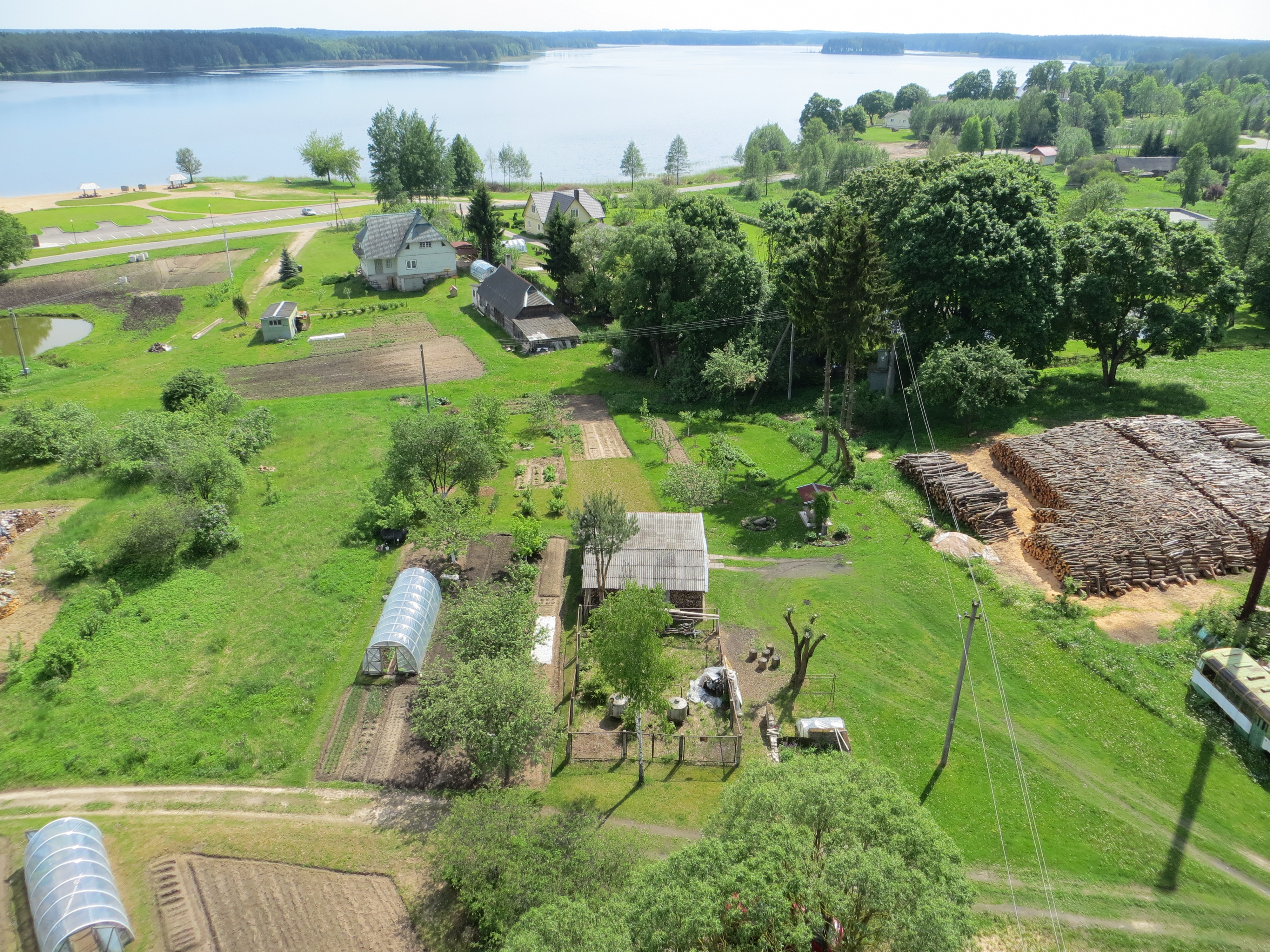 Joniškis, Lithuania